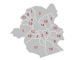 Gemenge vun der Haaptstadregioun Bréissel